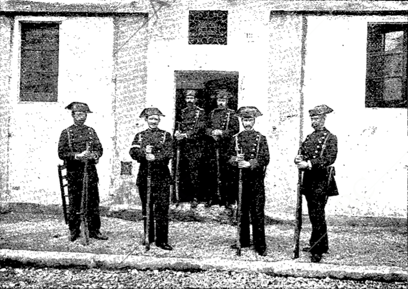 Cuartel de Badalona durante la intentona carlista de octubre de 1900